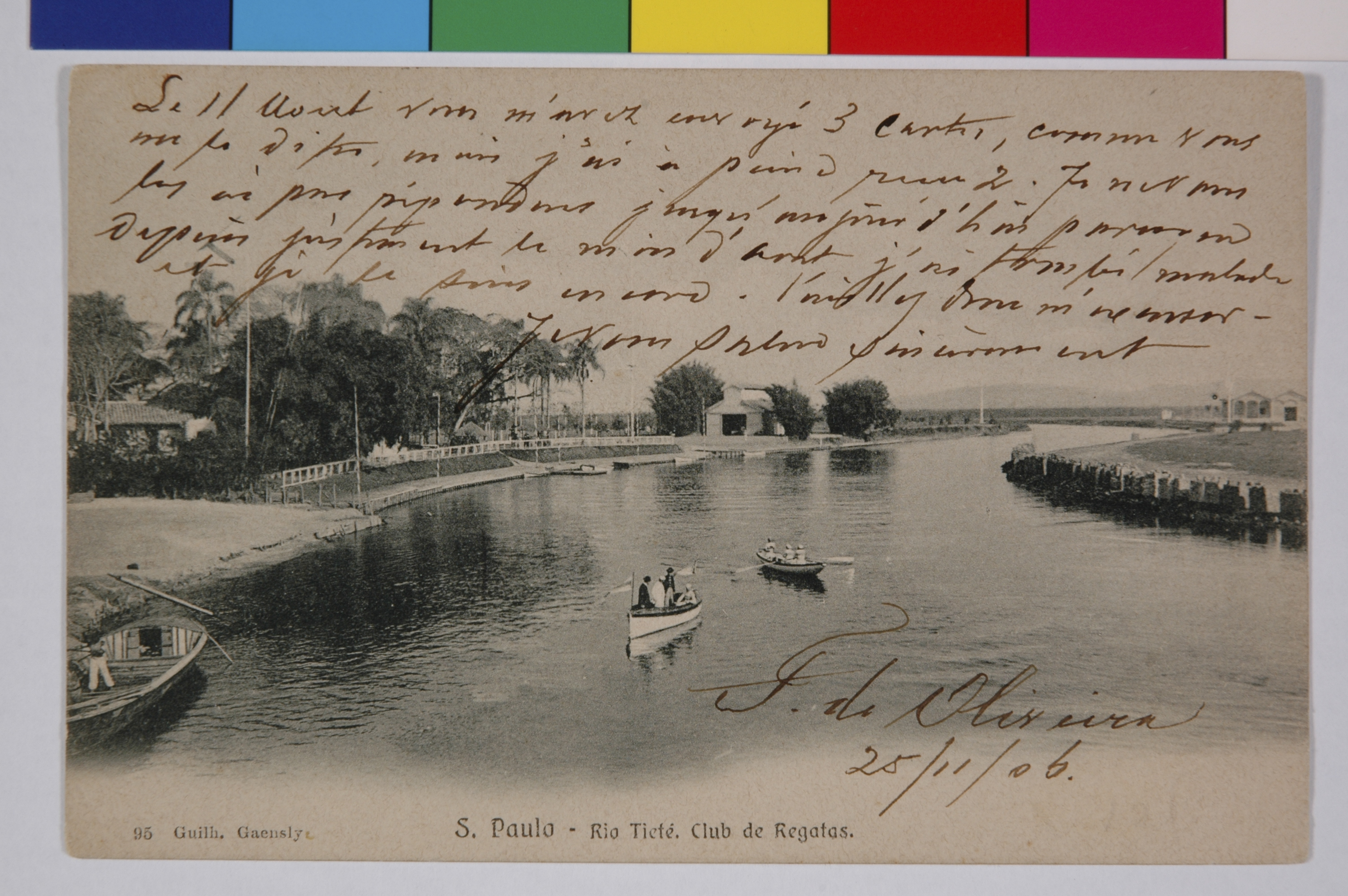 Obra que integra o acervo do Museu Paulista da USP.